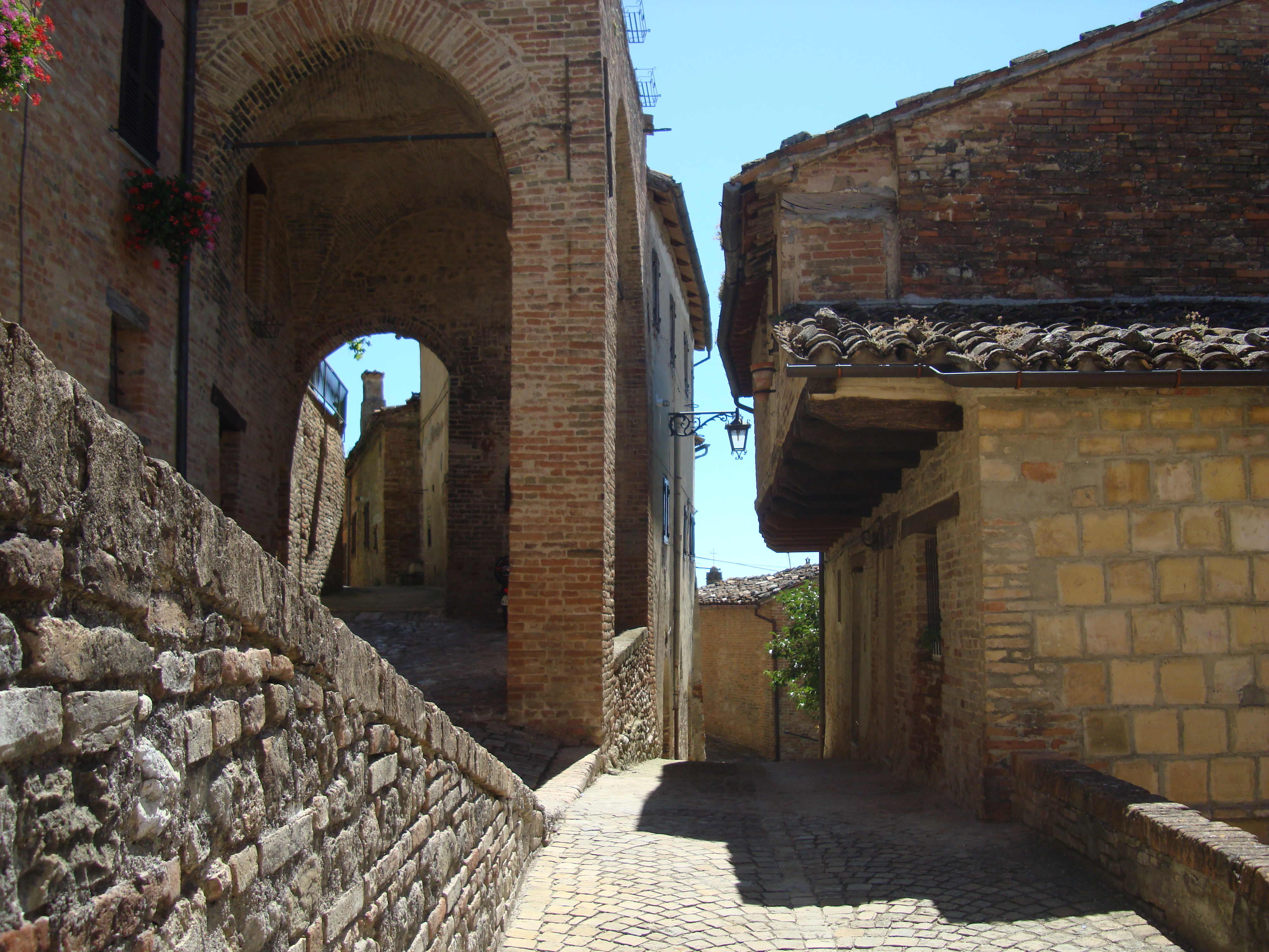 Sarnano - Arco del Trecento